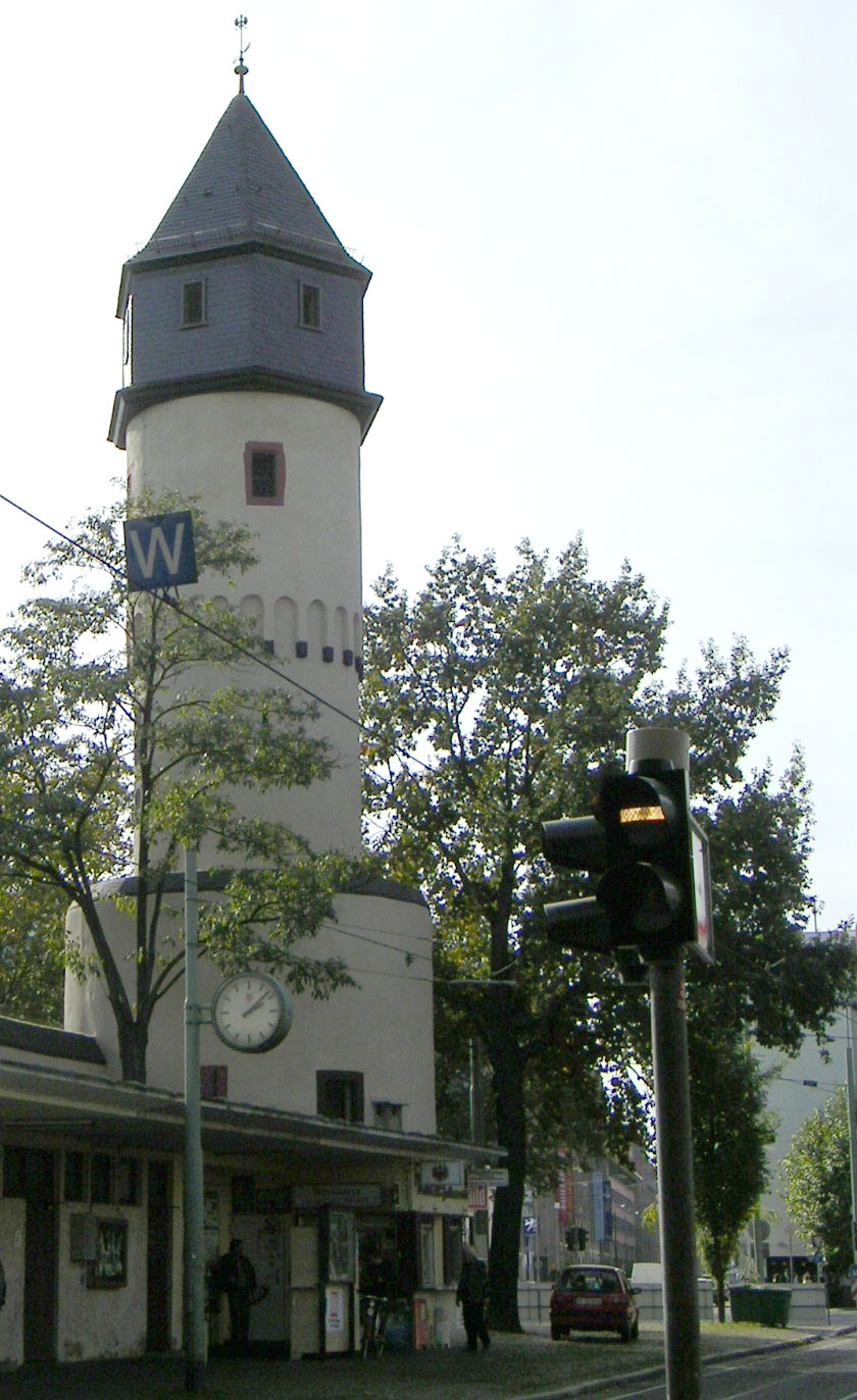 Beschreibung=Die Galluswarte auf der Mainzer Landstraße, Blickrichtung Westen/Frankfurt-Höchst Source=Selbst fotografiert Author=— Melkom (±) Date=24. Oktober 2004 other_versions=- Permission=GFDL